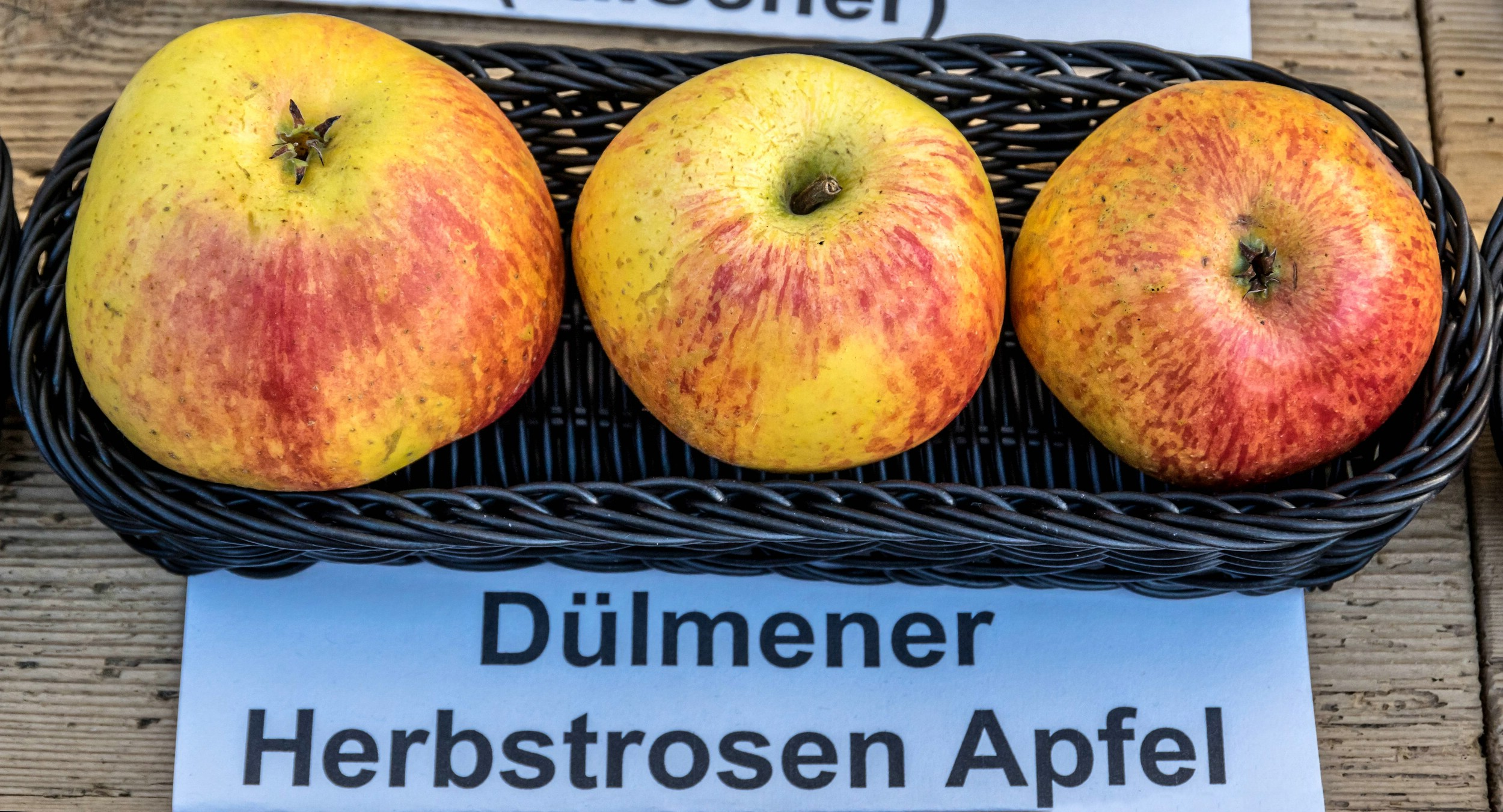 Alte Apfelsorten, von denen es im Badischen noch tragende Bäume gibt. Alle Aufnahmen aus dem Oktober 2015